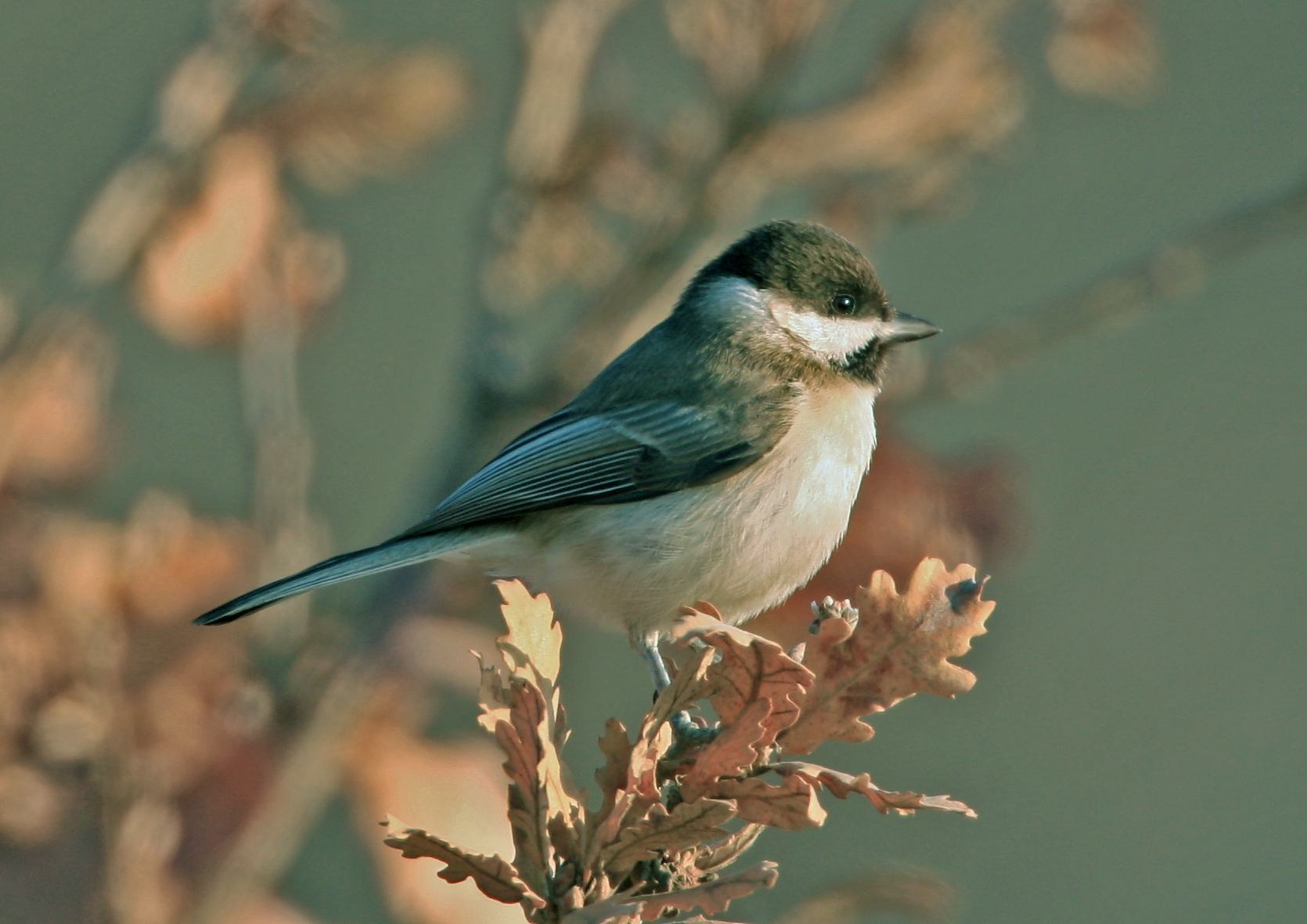 Sombre Tit Poecile lugubris, Bulgaria